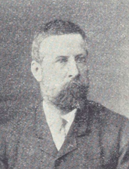 "M. Richard Waddington, sénateur".